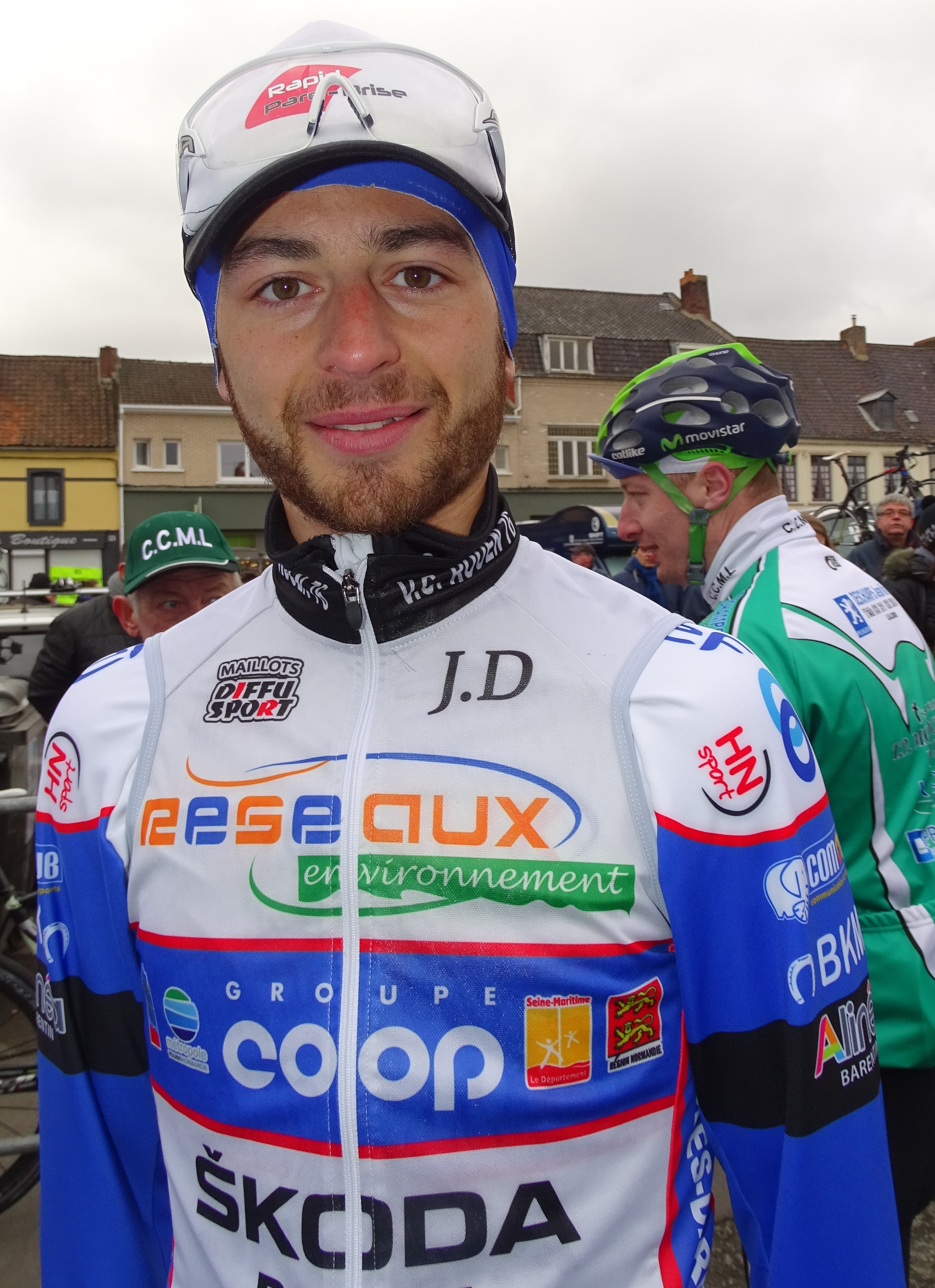 Reportage réalisé le dimanche 6 mars à l'occasion du départ et de l'arrivée du Grand Prix de Lillers-Souvenir Bruno Comini 2016 à Lillers, Pas-de-Calais, Nord-Pas-de-Calais, France.